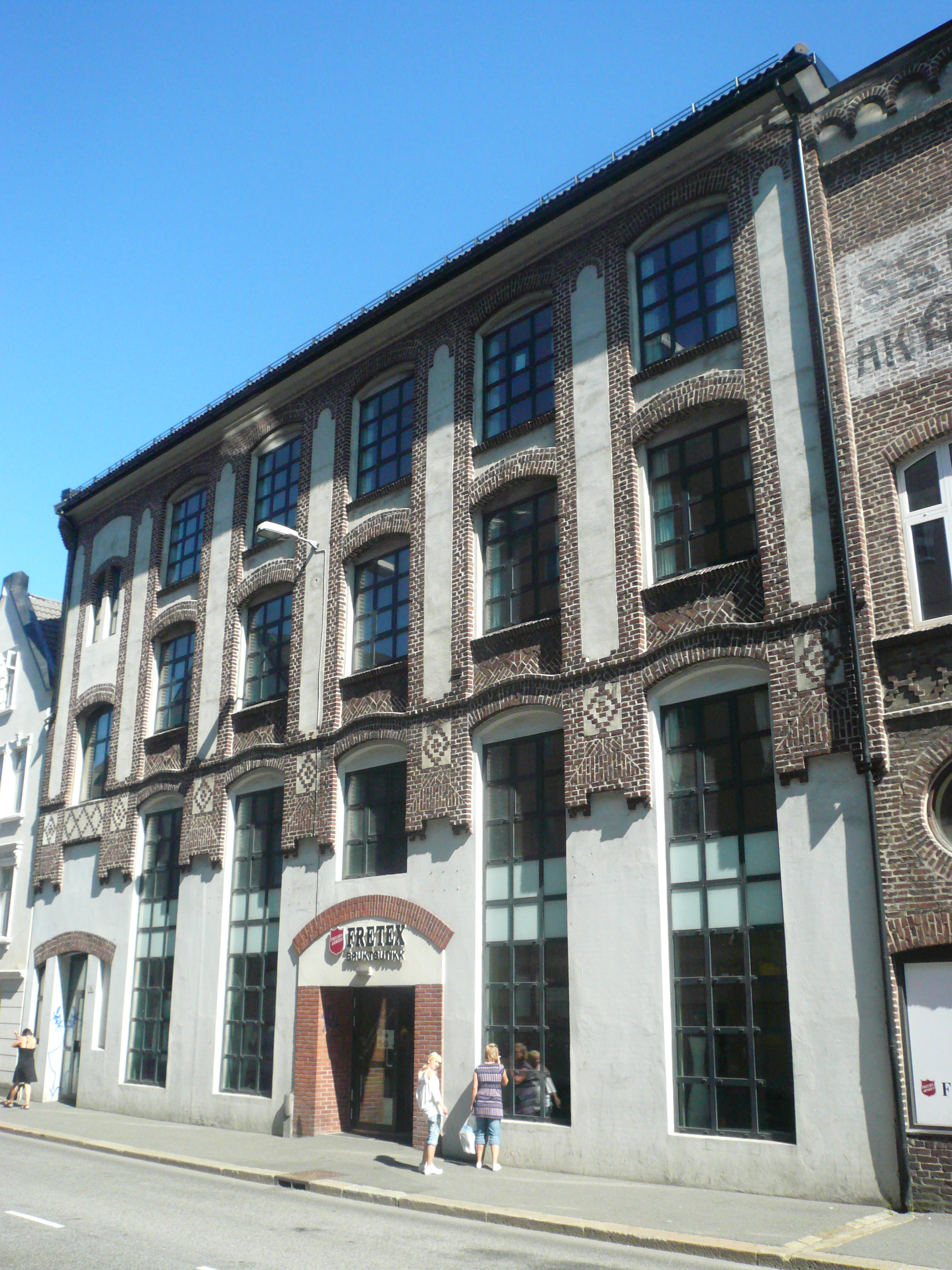 Schak Bulls fasade fra 1914 for gardinfabrikken i Lars Hillesgate i Bergen er inspirert av lokal historie og tegnet i hanseatisk stil.